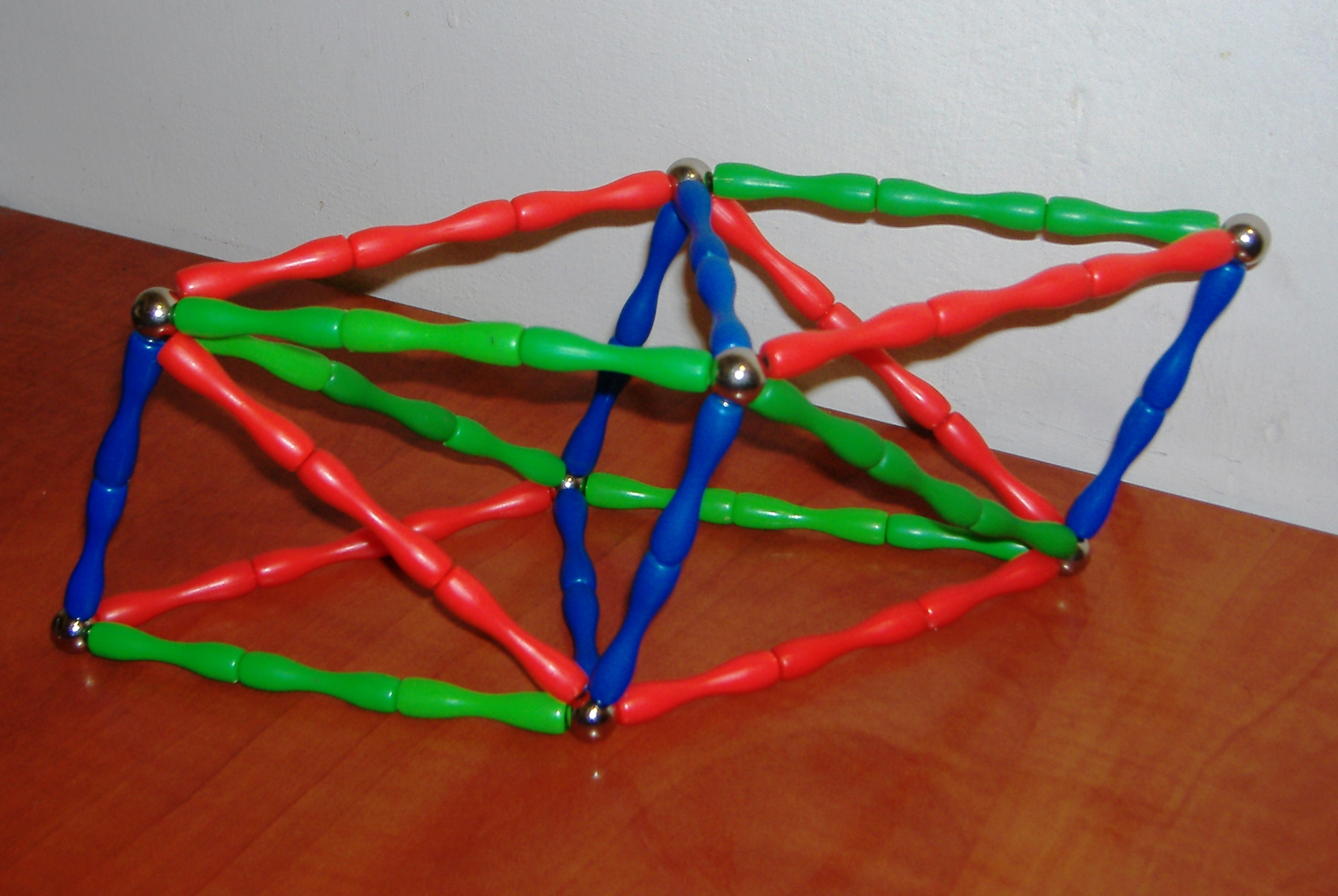 מקבילון יתדוני